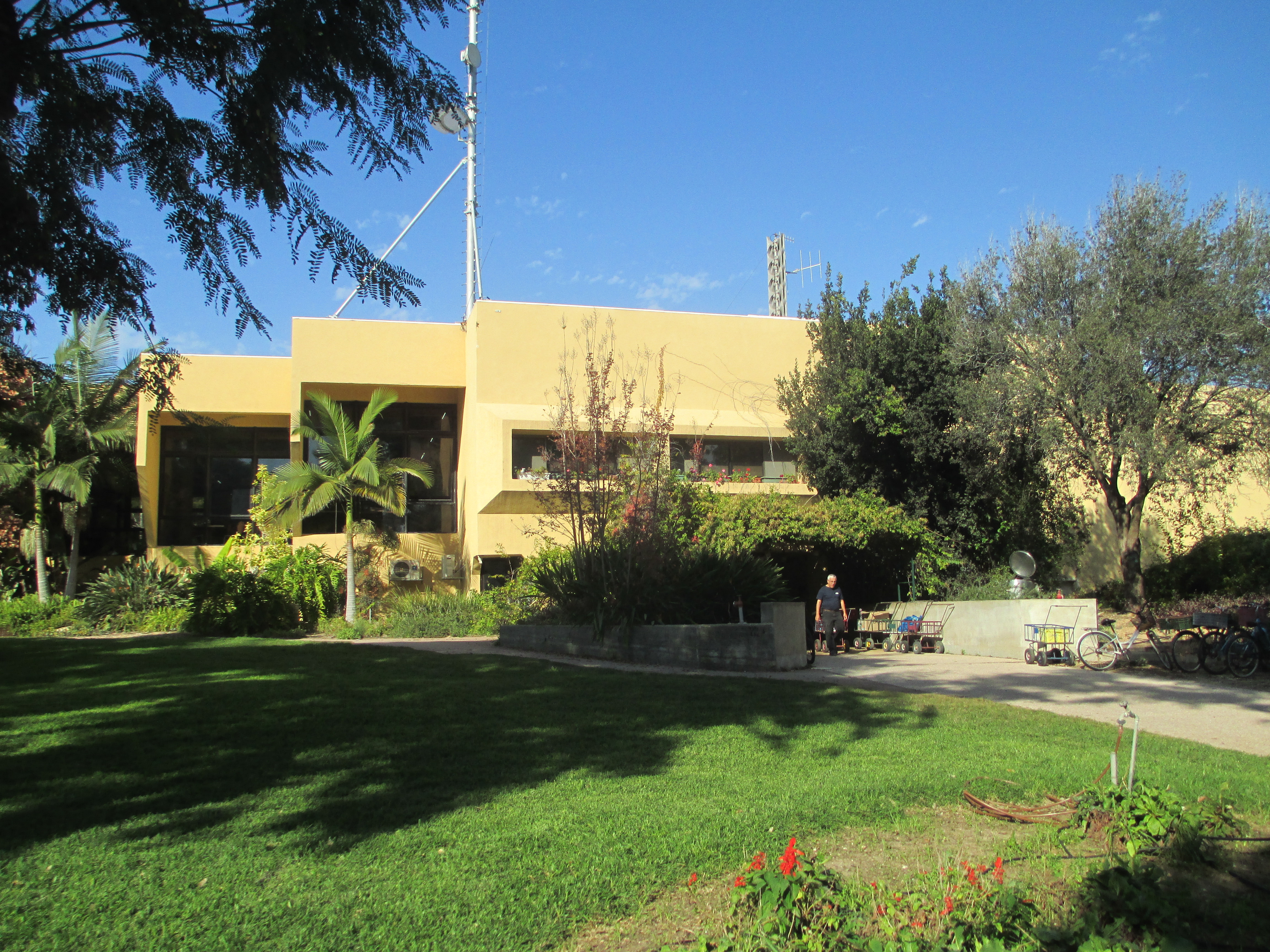 חדר האוכל בעלומים